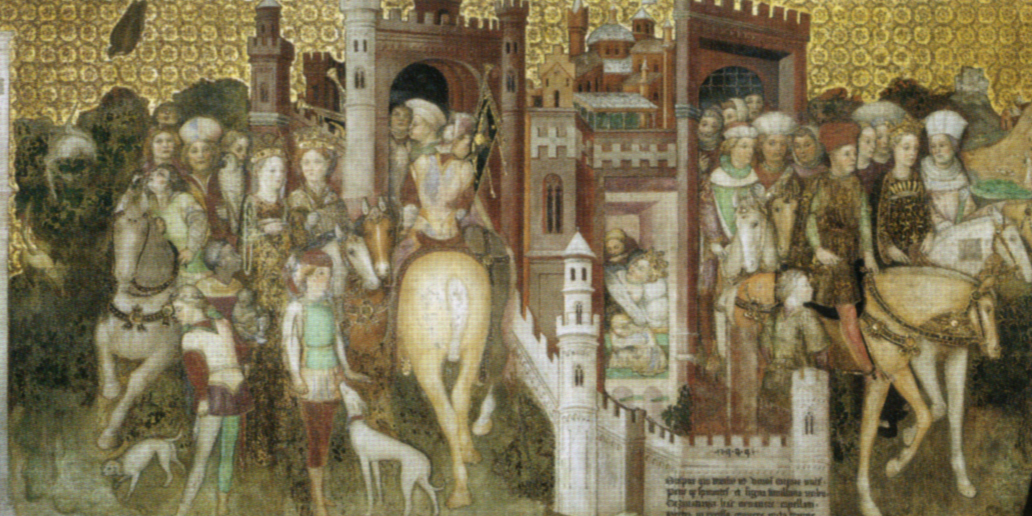 Fratelli zavattari, storie della regina teodolinda, 1444, monza, duomo